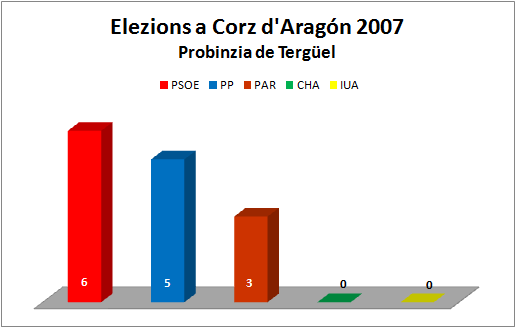 Aragonés: Grafico d'as elezions a Corz d'Aragón de la añada 2007